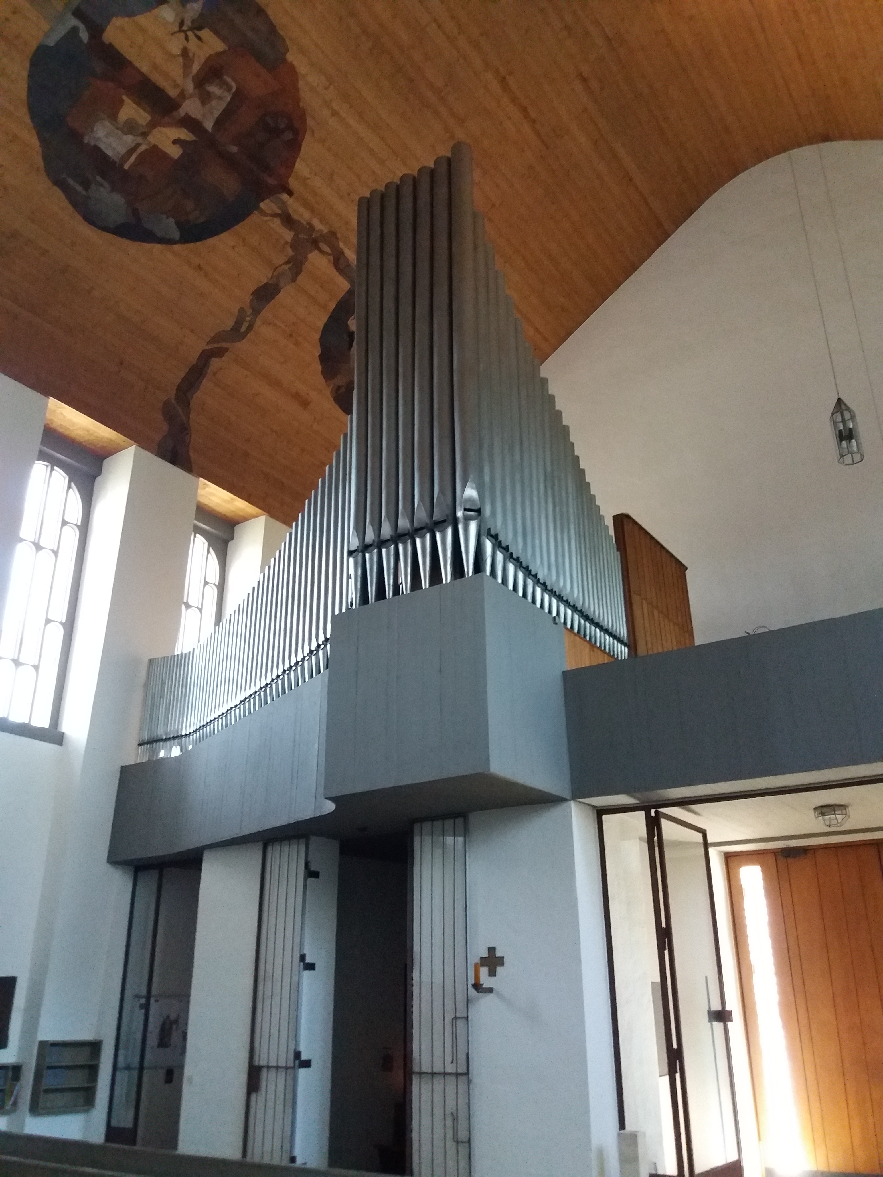 Orgel der kath. Pfarrkirche St. Josef der Arbeiter in Senden an der Iller, Landkreis Neu-Ulm, Schwaben, Bayern. Die Orgel wurde nach Auskunft der Organistin im Jahr 1958 von der Orgelbaufirma Gebrüder Sandtner erbaut; ca. 2016 renoviert und leicht umgebaut. Sie ist jedoch nicht im Werkverzeichnis auf der Homepage der Firma Orgelbau Sandtner enthalten.